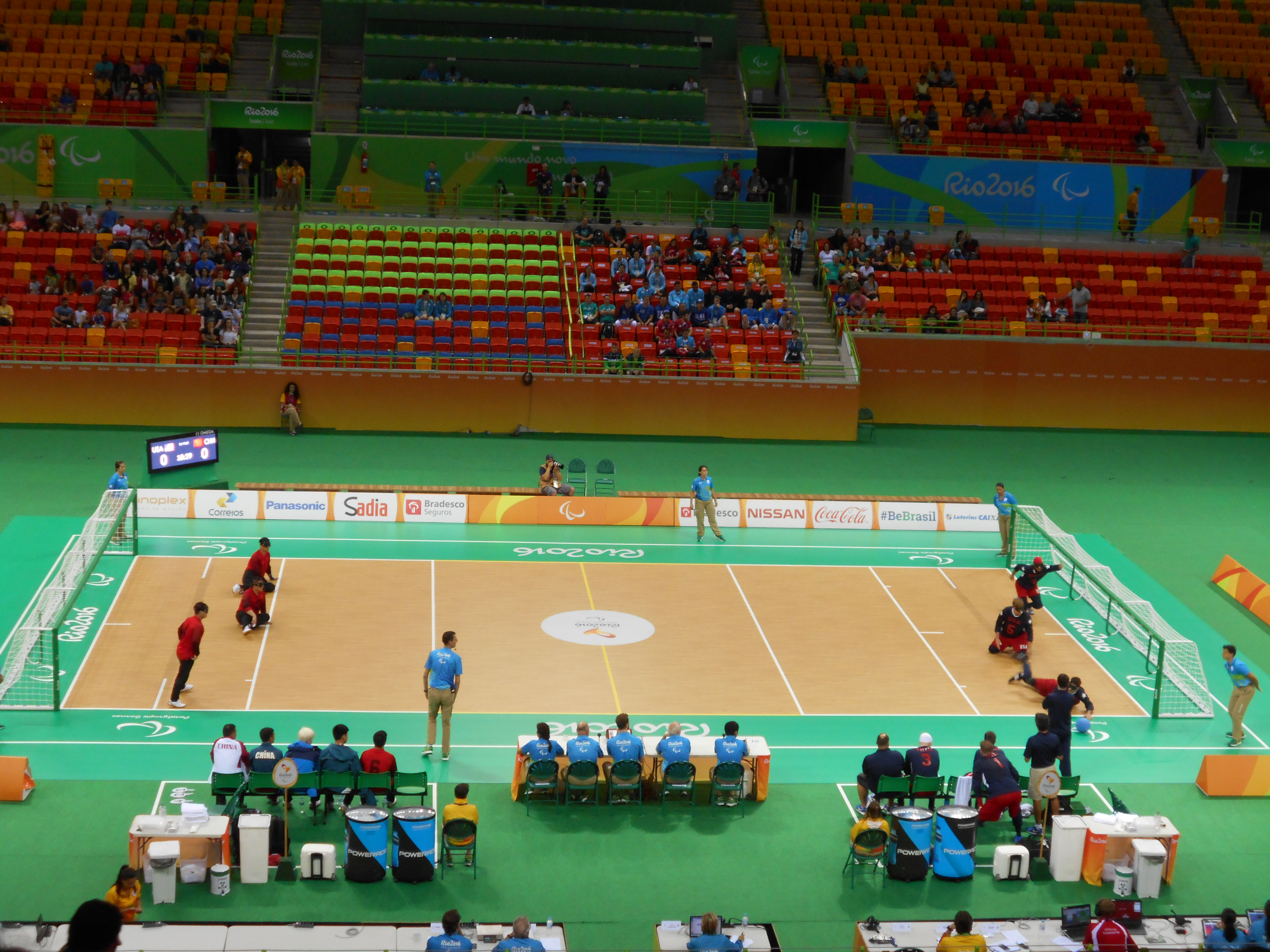 Partida de goalball masculino entre as seleções da China e dos Estados Unidos.